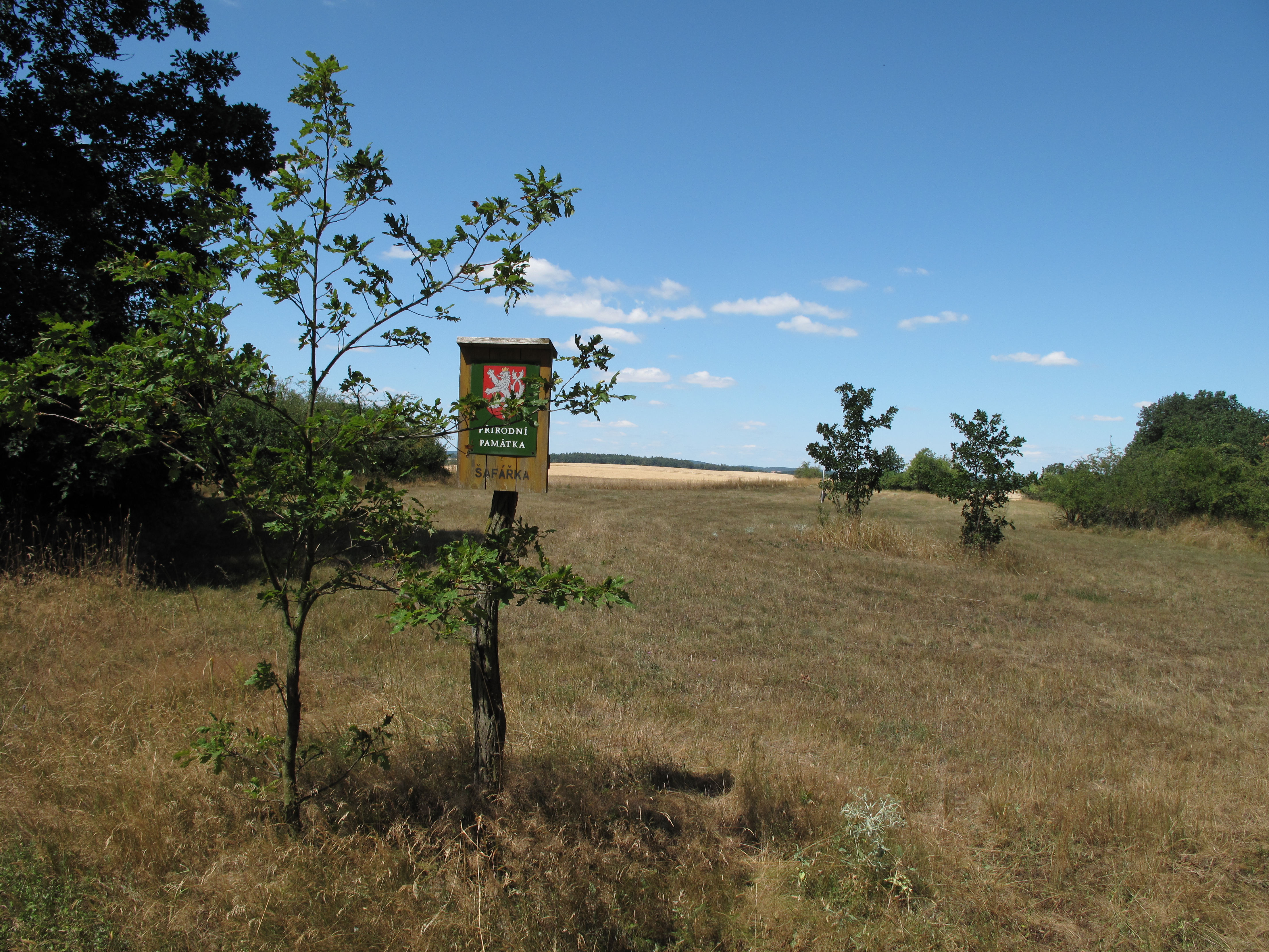 Přírodní památka Šafářka. Okres Znojmo, Česká republika.